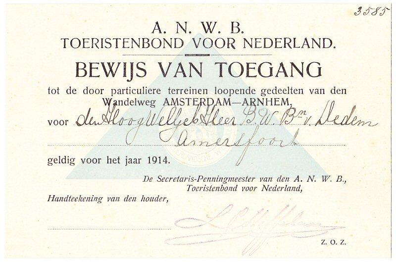 Bewijs van toegang tot het de door particuliere terreinen loopende gedeelten van den Wandelweg Amsterdam-Arnhem (1914)